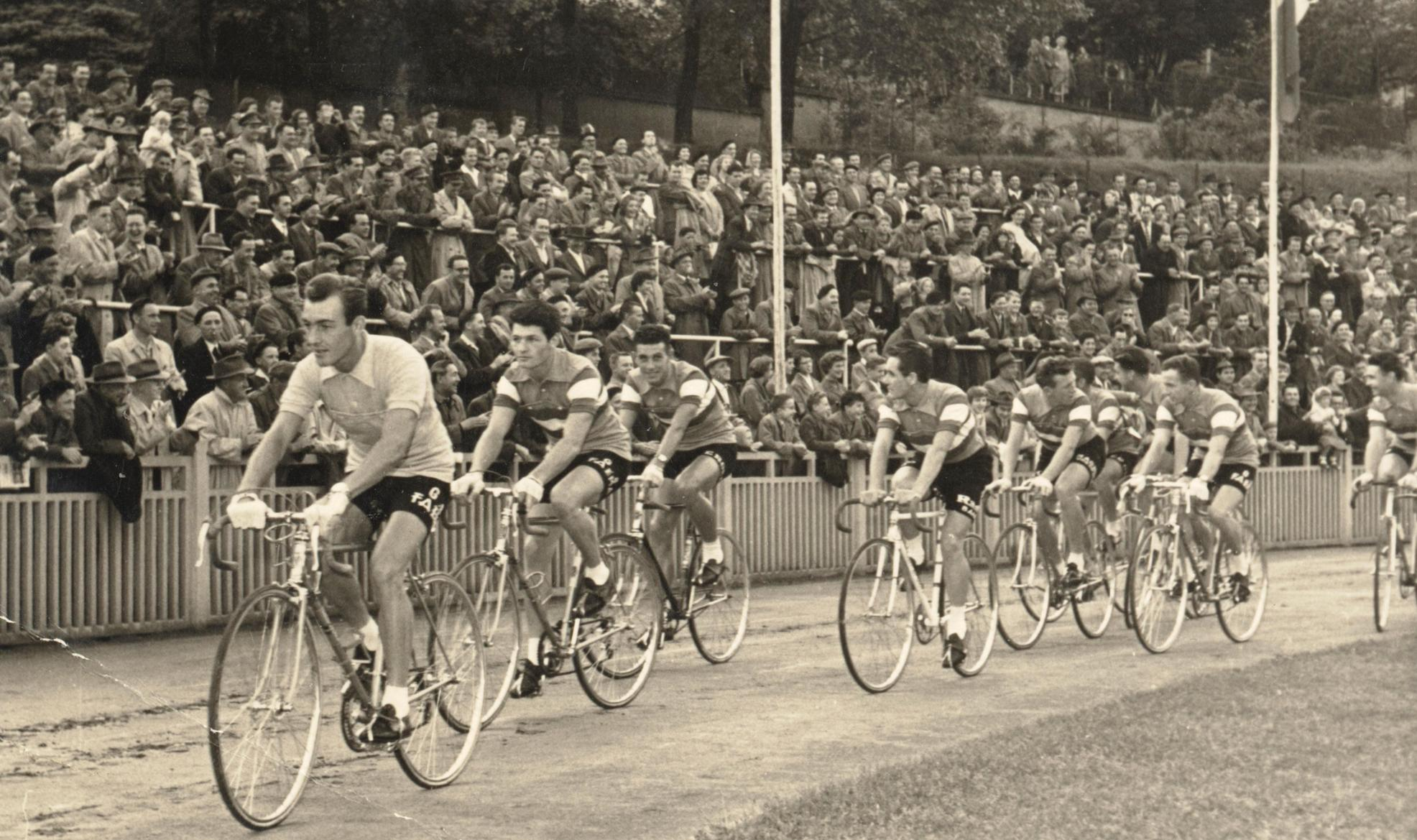 Nelux Equipe 1958 um Stadion